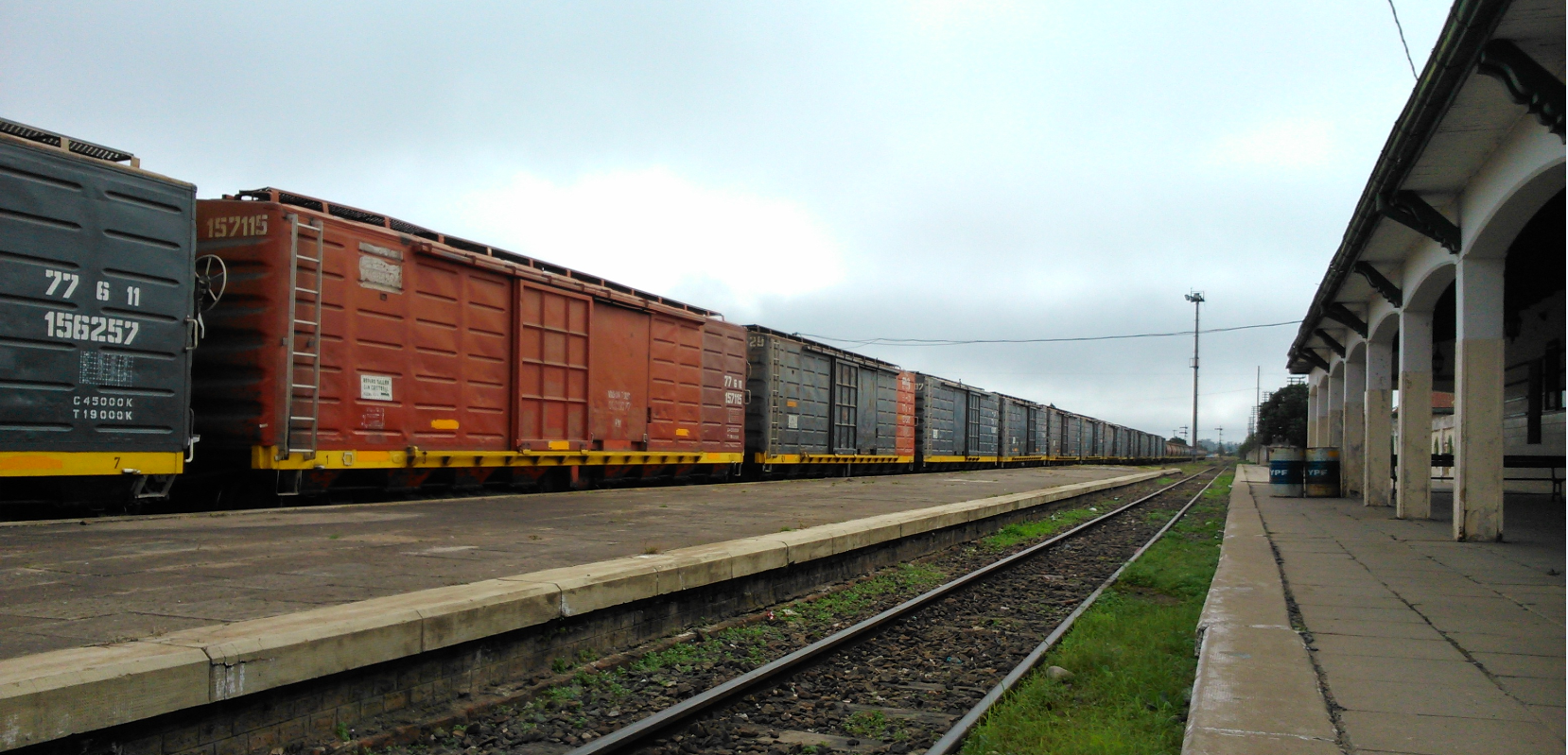 Old train station